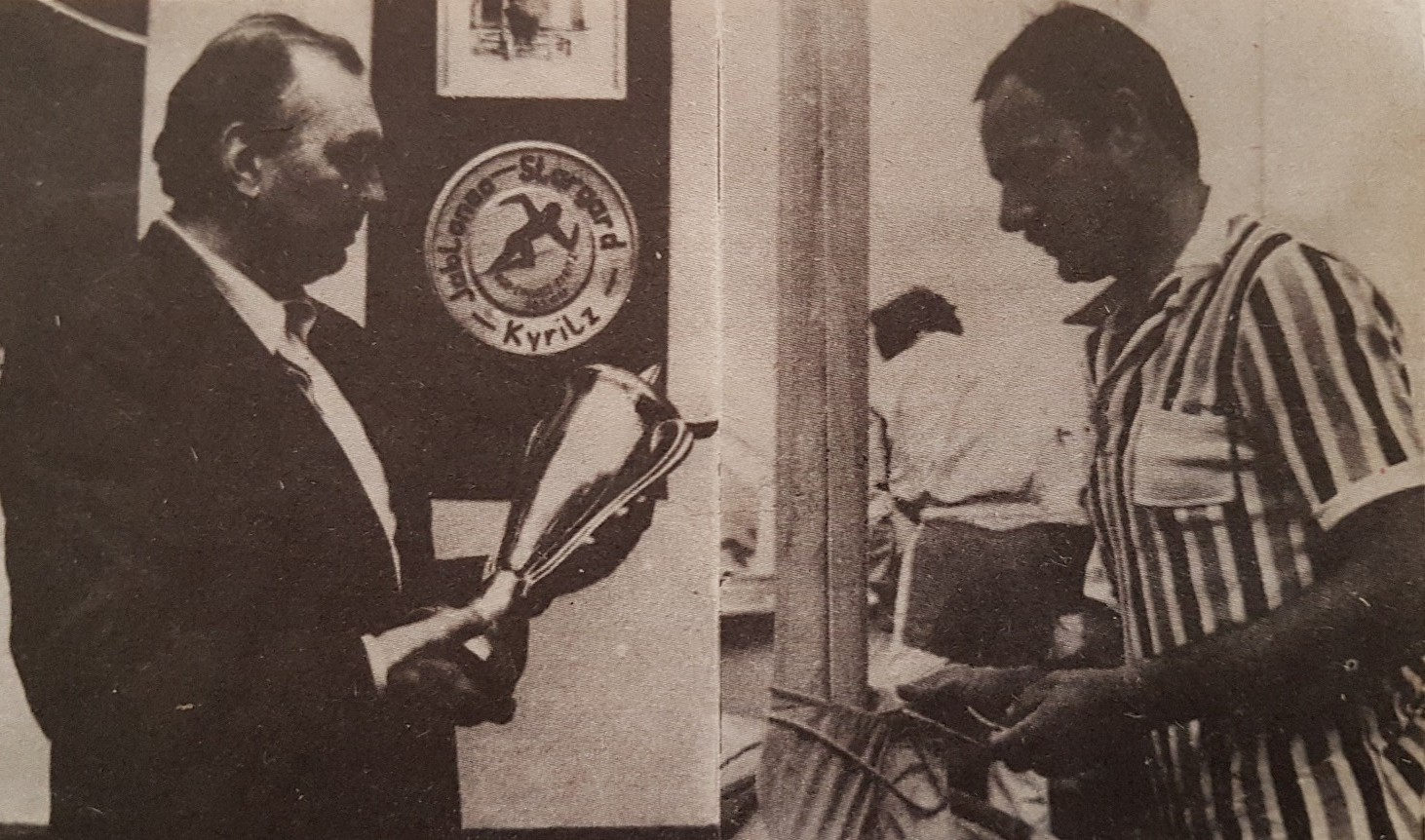 Żeglarz LKS Pomorza Stanisław Pawłowicz